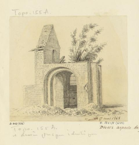 Ruines de la Collégiale lors du percement du bd de Port-Royal